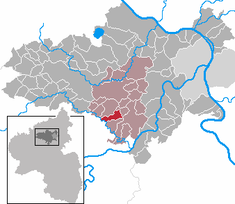 Naunheim in Rhineland-Palatinate - district Mayen-Koblenz